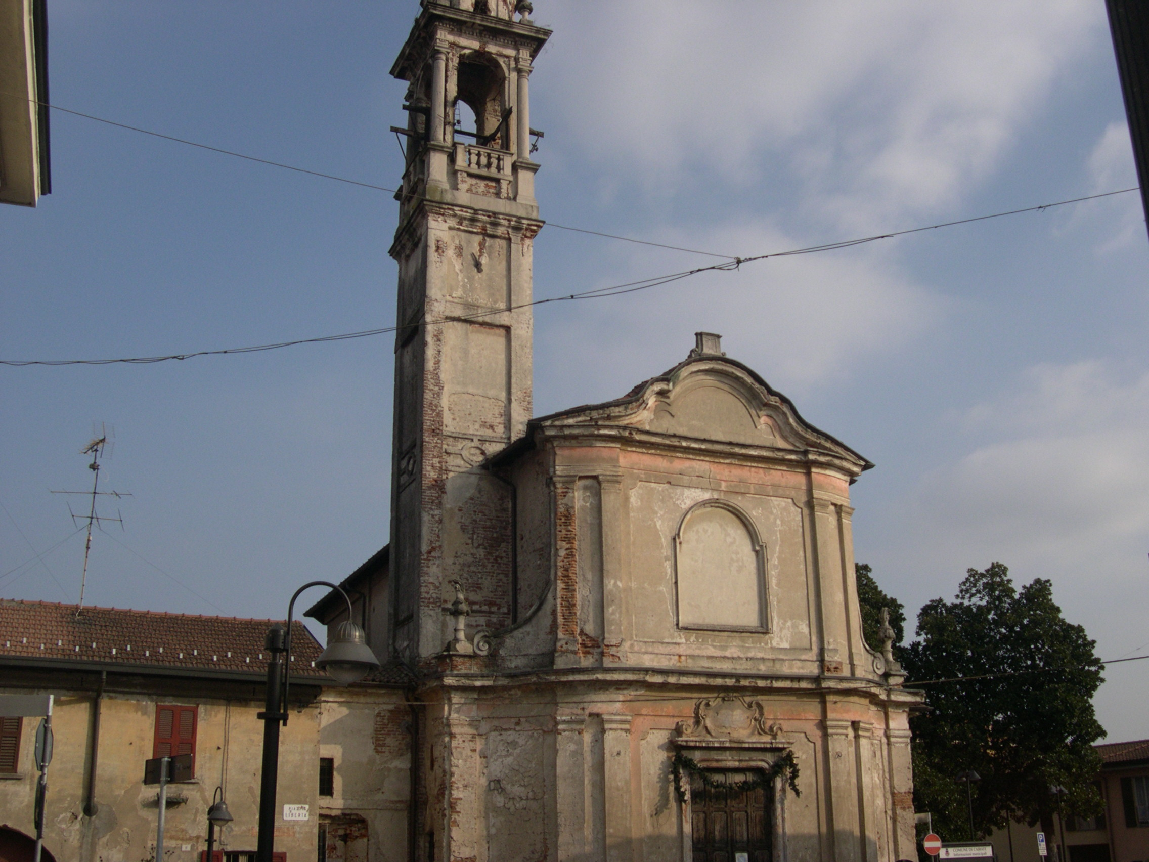 Chiesa di Sant'Ambrogio, Cairate